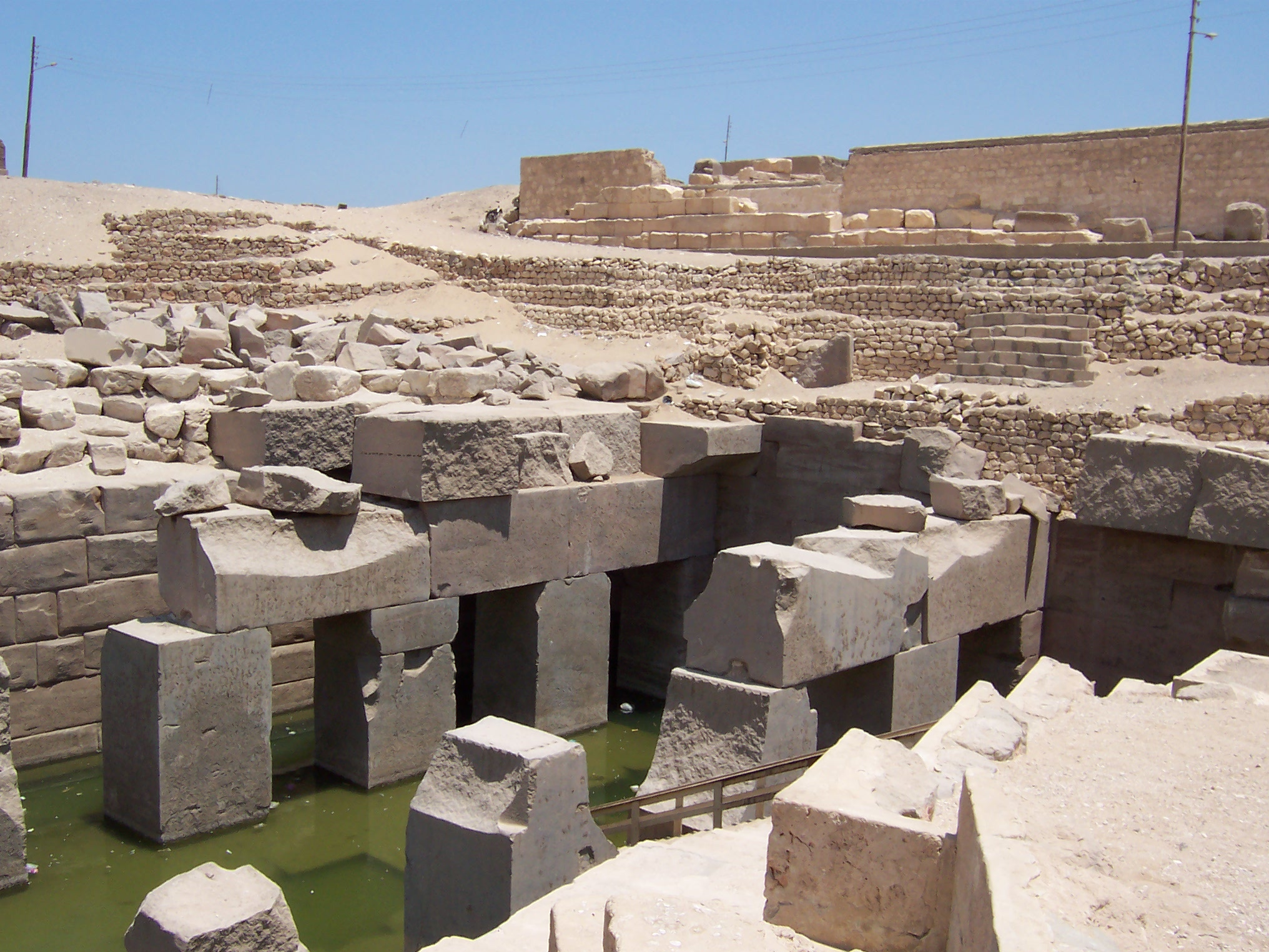 Foto tomada en Julio del 2004, Abidos, Egipto. Se puede ver el estado actual del Osireion.